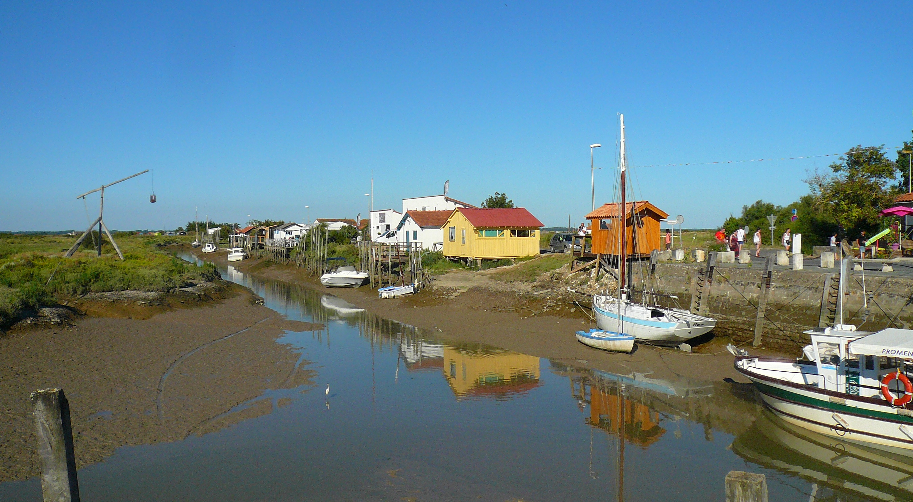 Le marais de la Seudre à Mornac en Charente-Maritime.